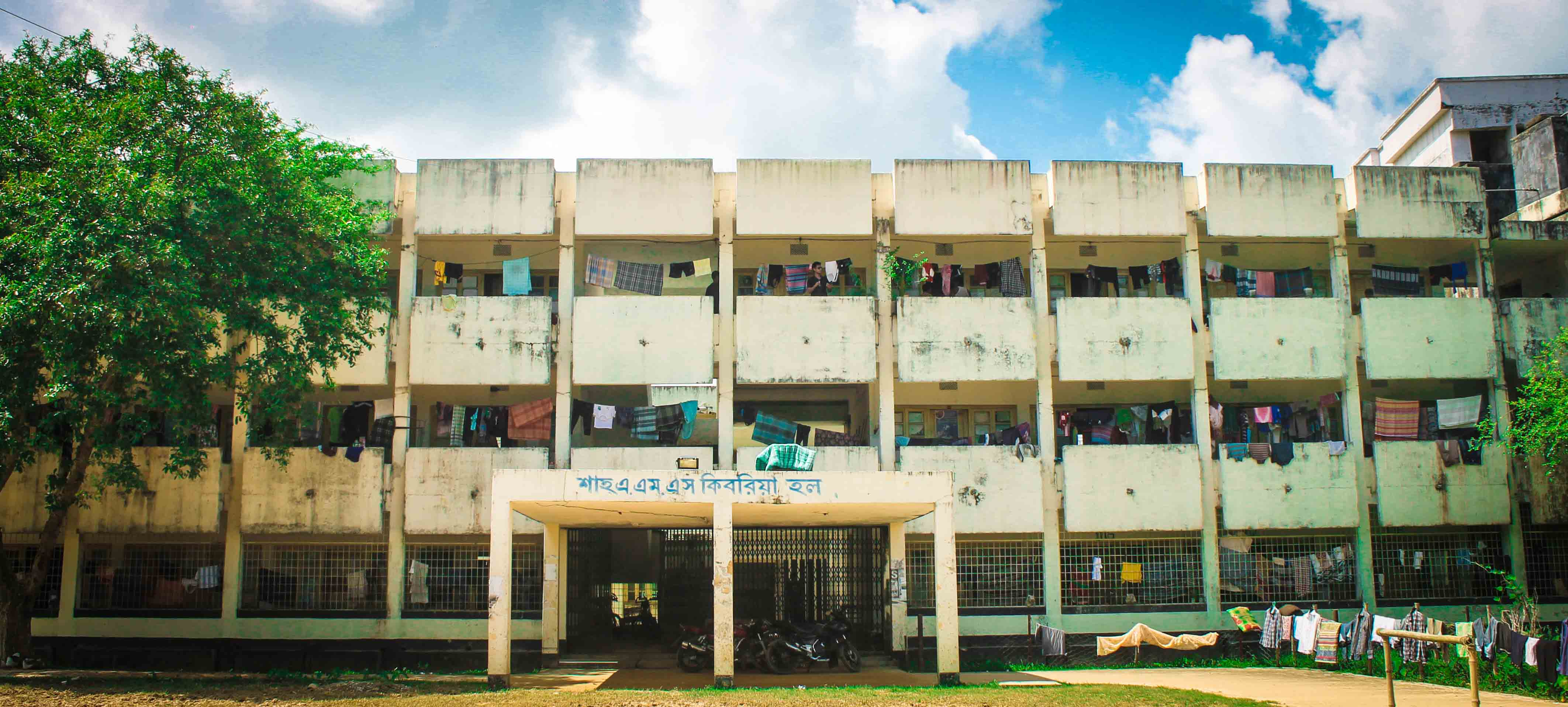 শাহ এ এম এস কিবরিয়া হল, বিশ্ববিদ্যালয়ের সবচেয়ে প্রাচীন ছাত্র হল।